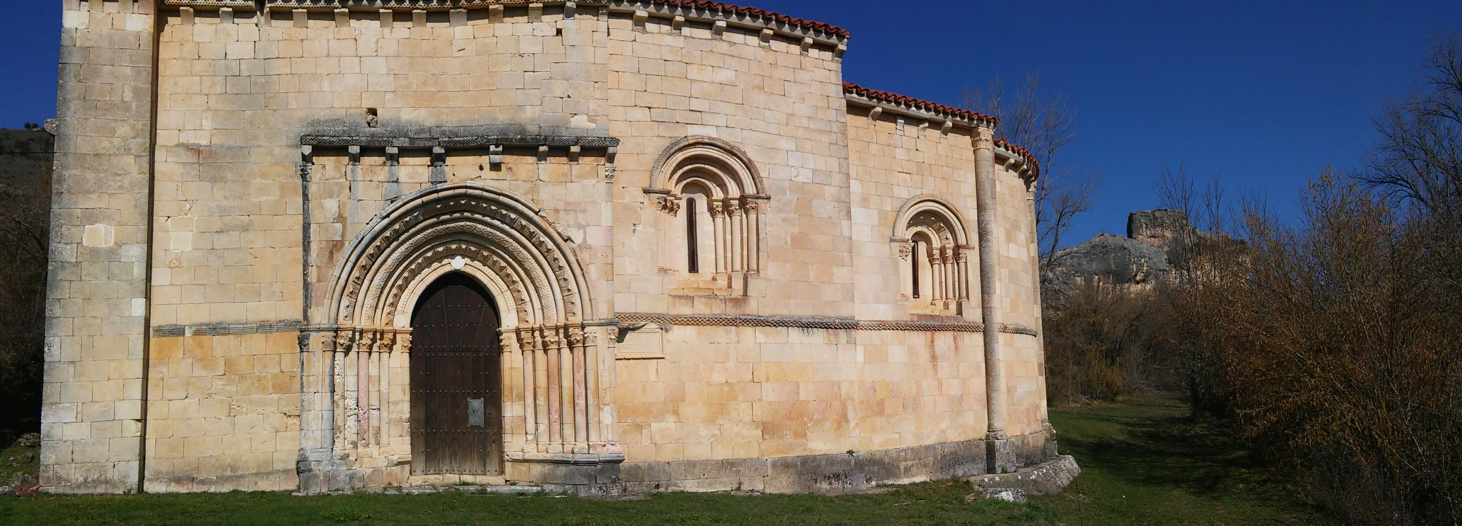 Markiz (Araba) herriko San Joan baseliza